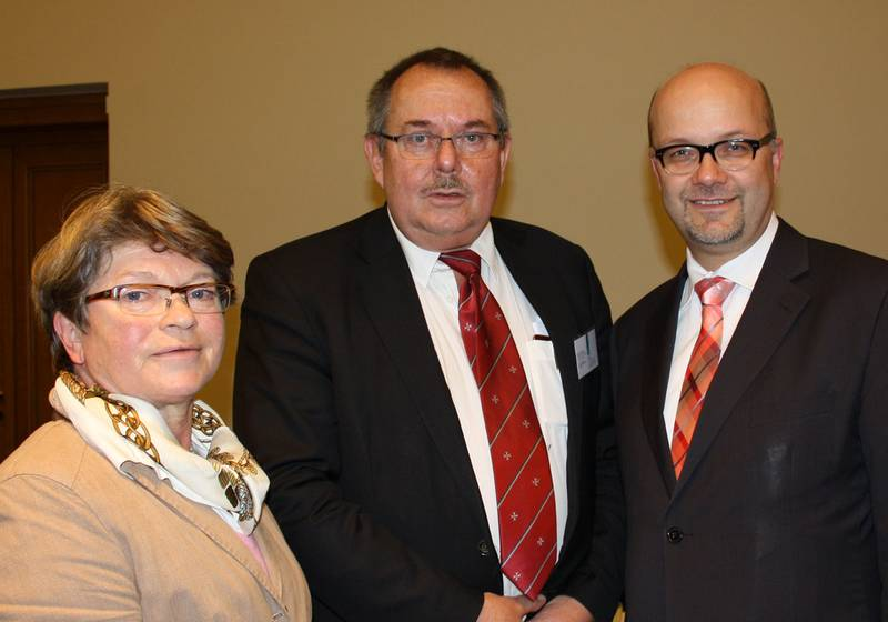 Fritz Felgentreu, Mieke Sentfleben und Volksbund-Landesgeschäftsführer Dr. Ingolf Wernicke nach der Wahl Felgentreus zum Landesvorsitzenden des Landesverbandes Berlin des Volksbund Deutsche Kriegsgräberfürsorge e. V.